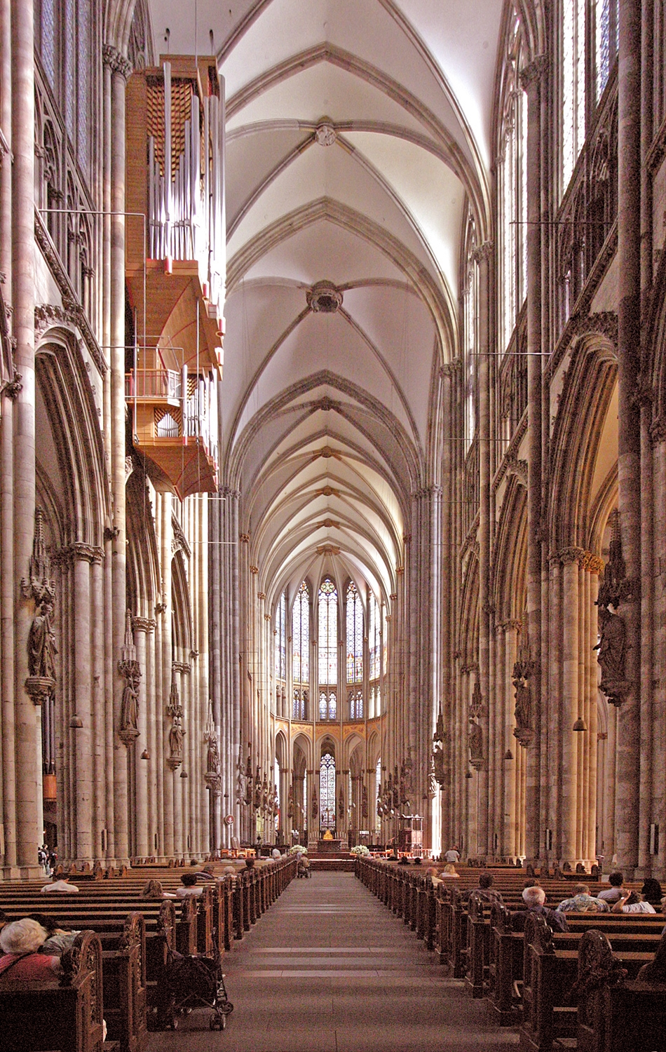 Kölner Doum.